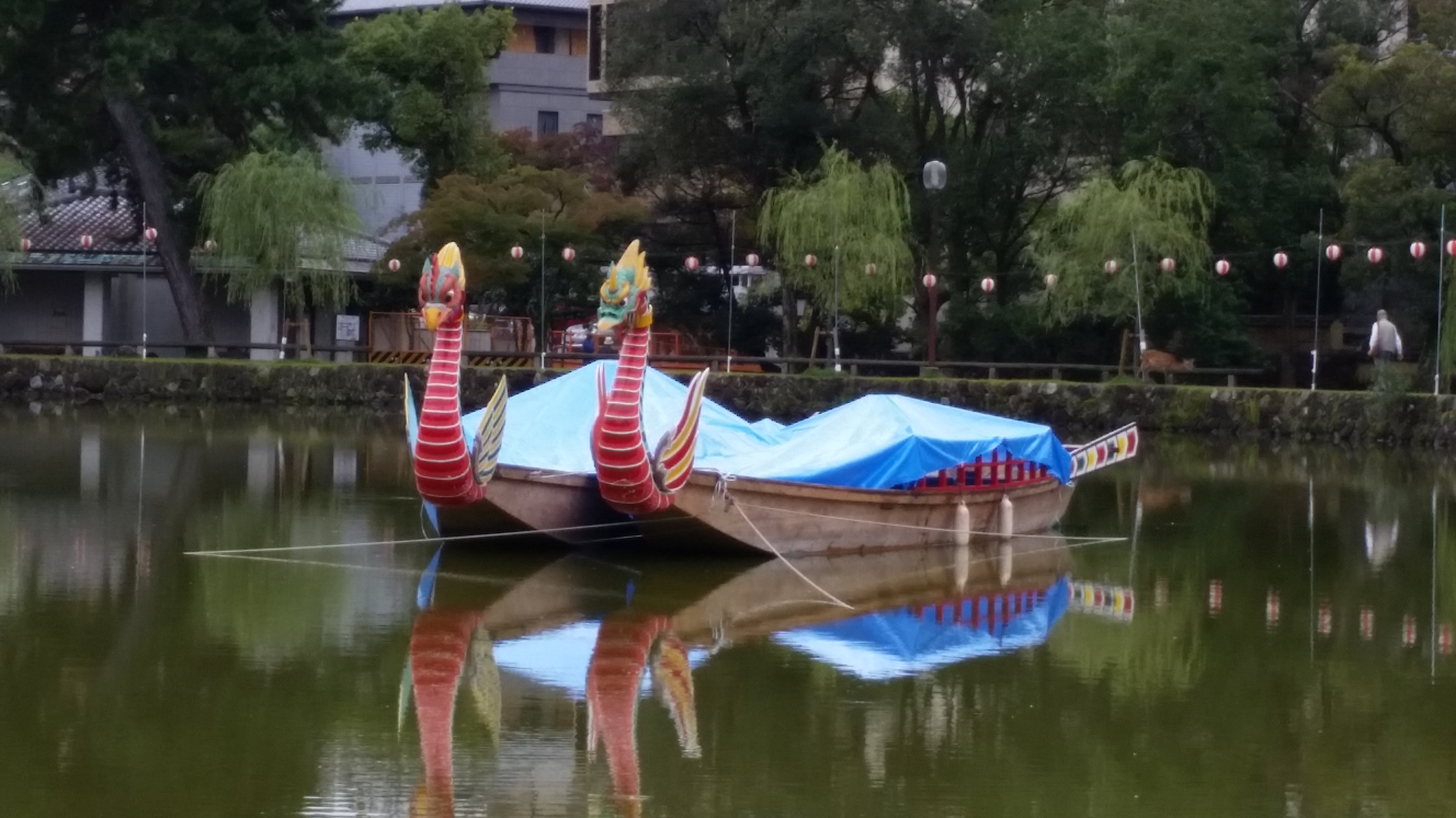 采女祭りの管弦舟（龍頭・鷁首）、奈良